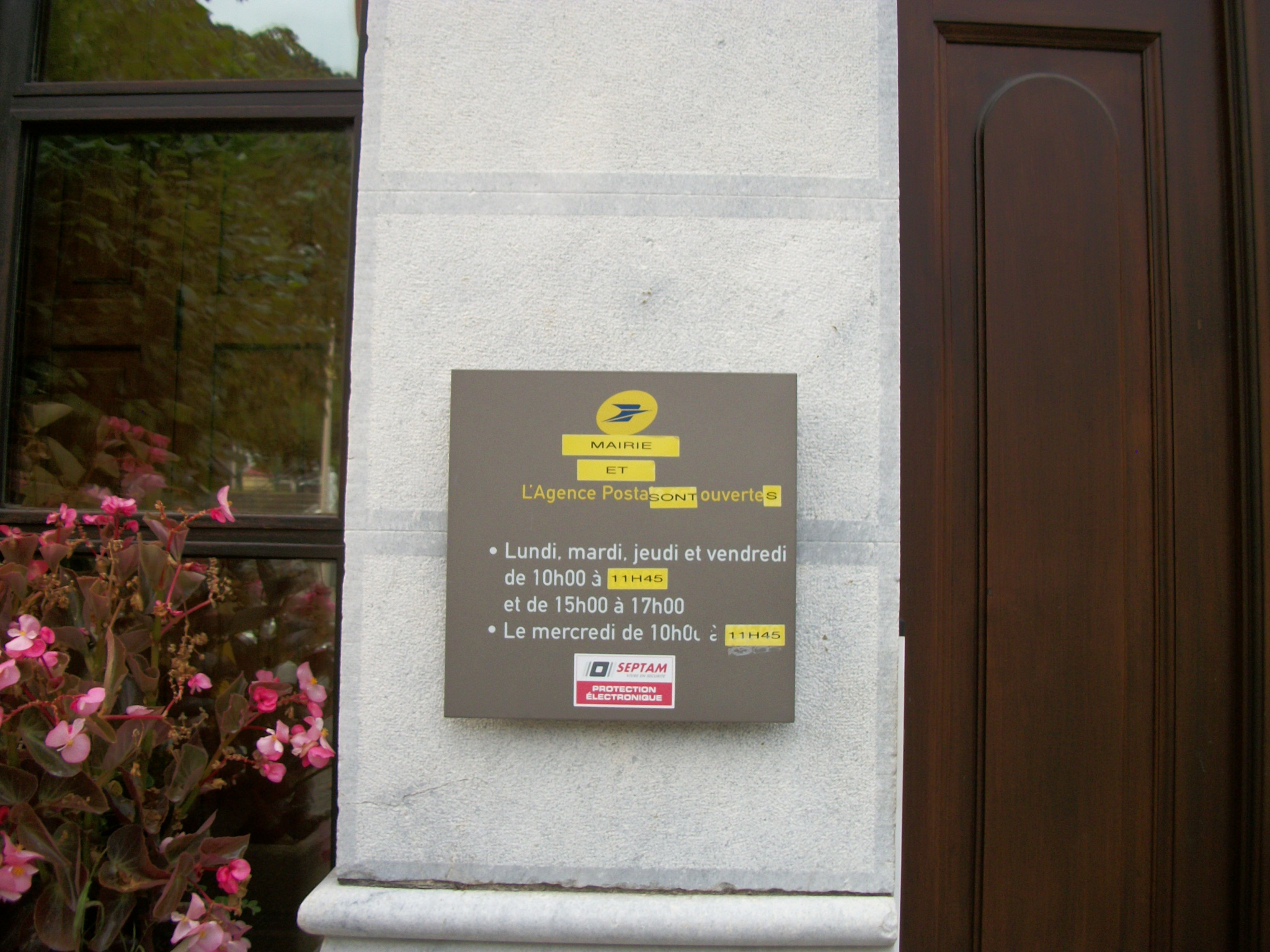 Informations sur les heures d'ouverture de la mairie et de l'agence postale communale